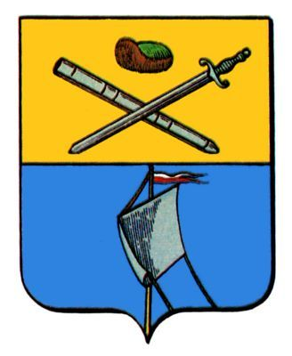 Герб Елатьмы, Рязанская область